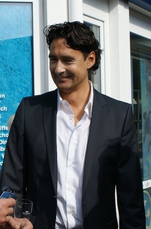 Ralf Allgöwer 2011